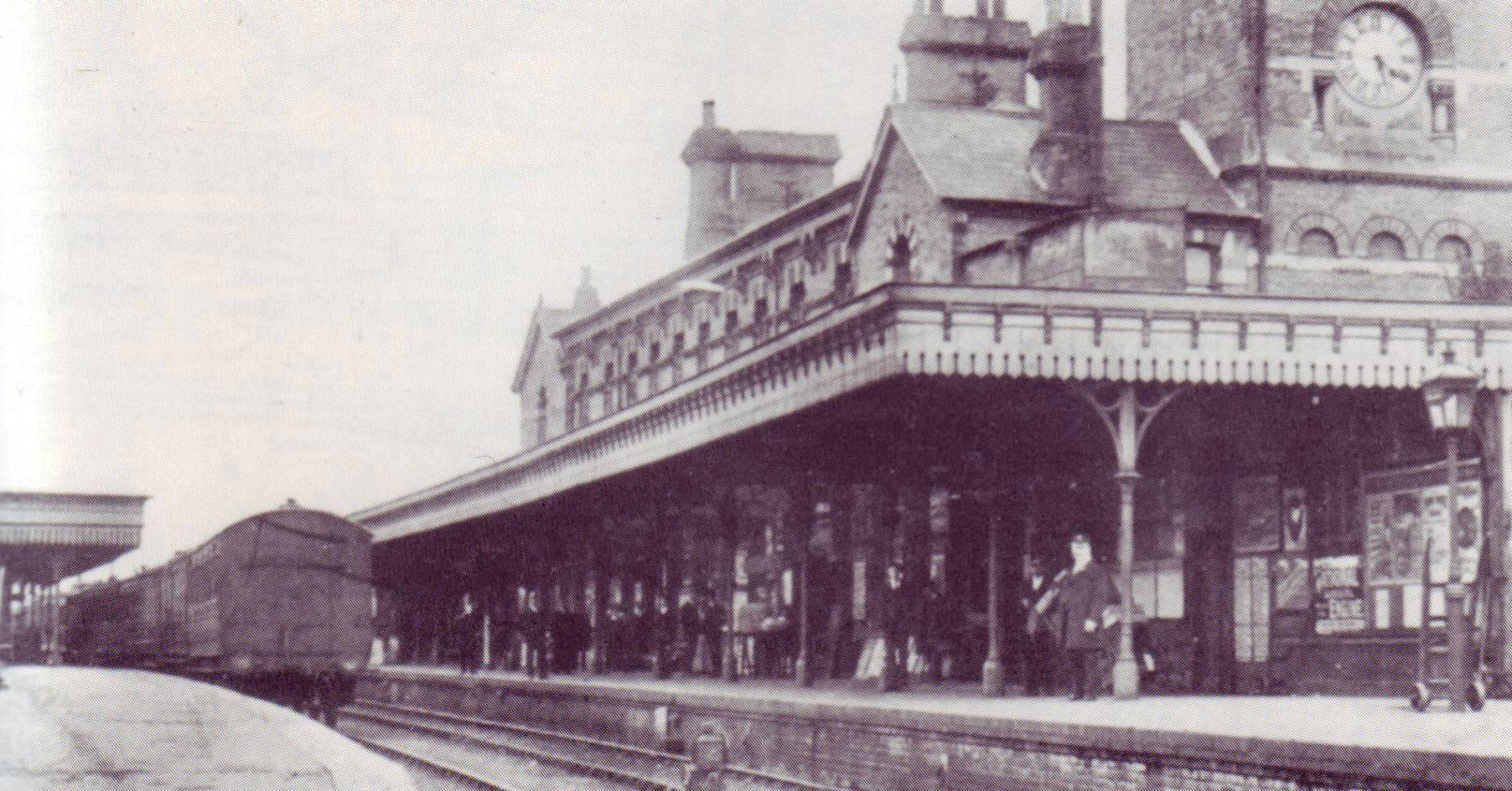 Tunbridge Wells West Station, Kent